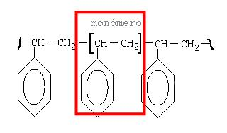 Poliestireno